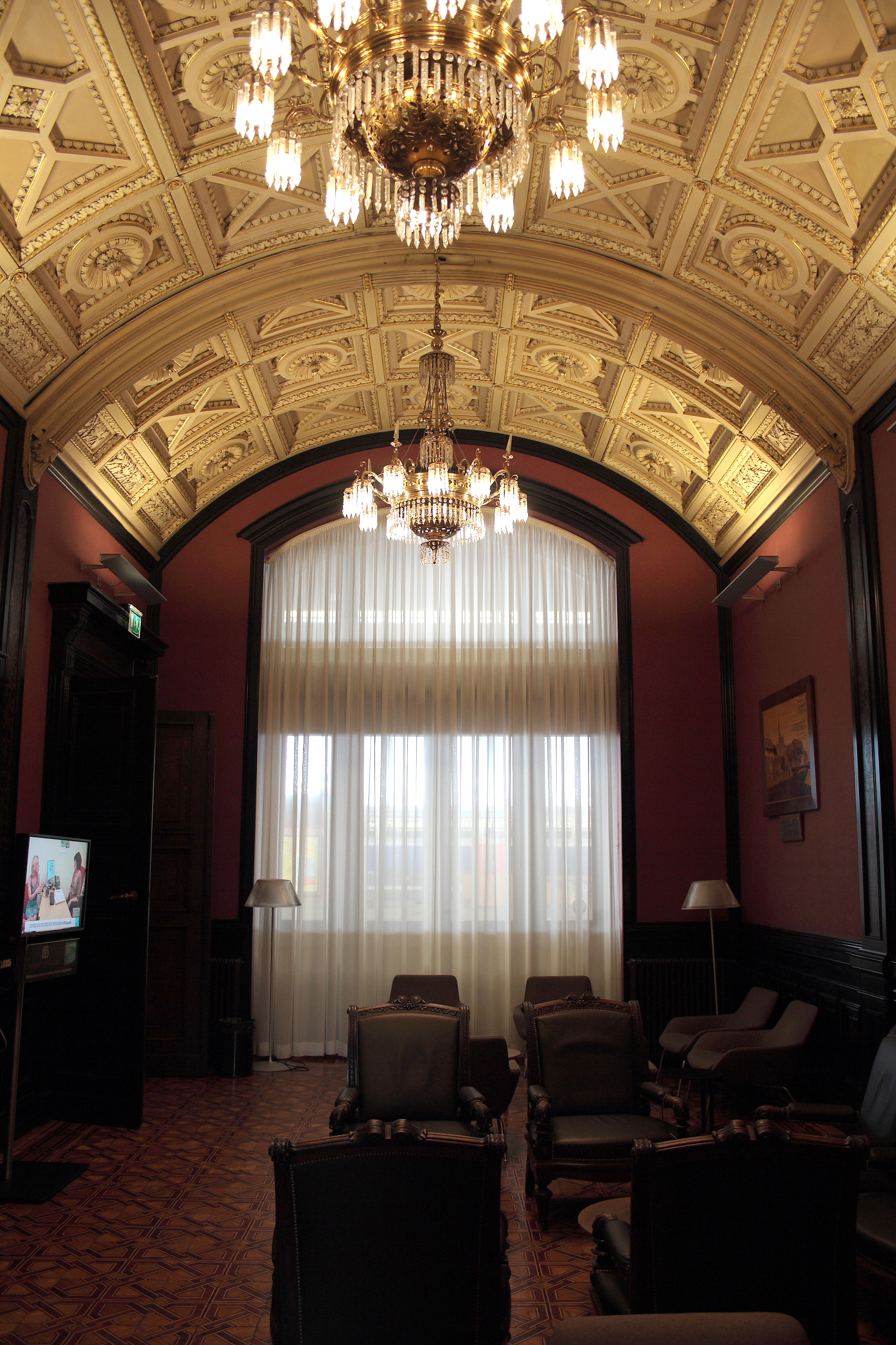 Salon Grand Voyageur (ancien salon de l'Empereur).